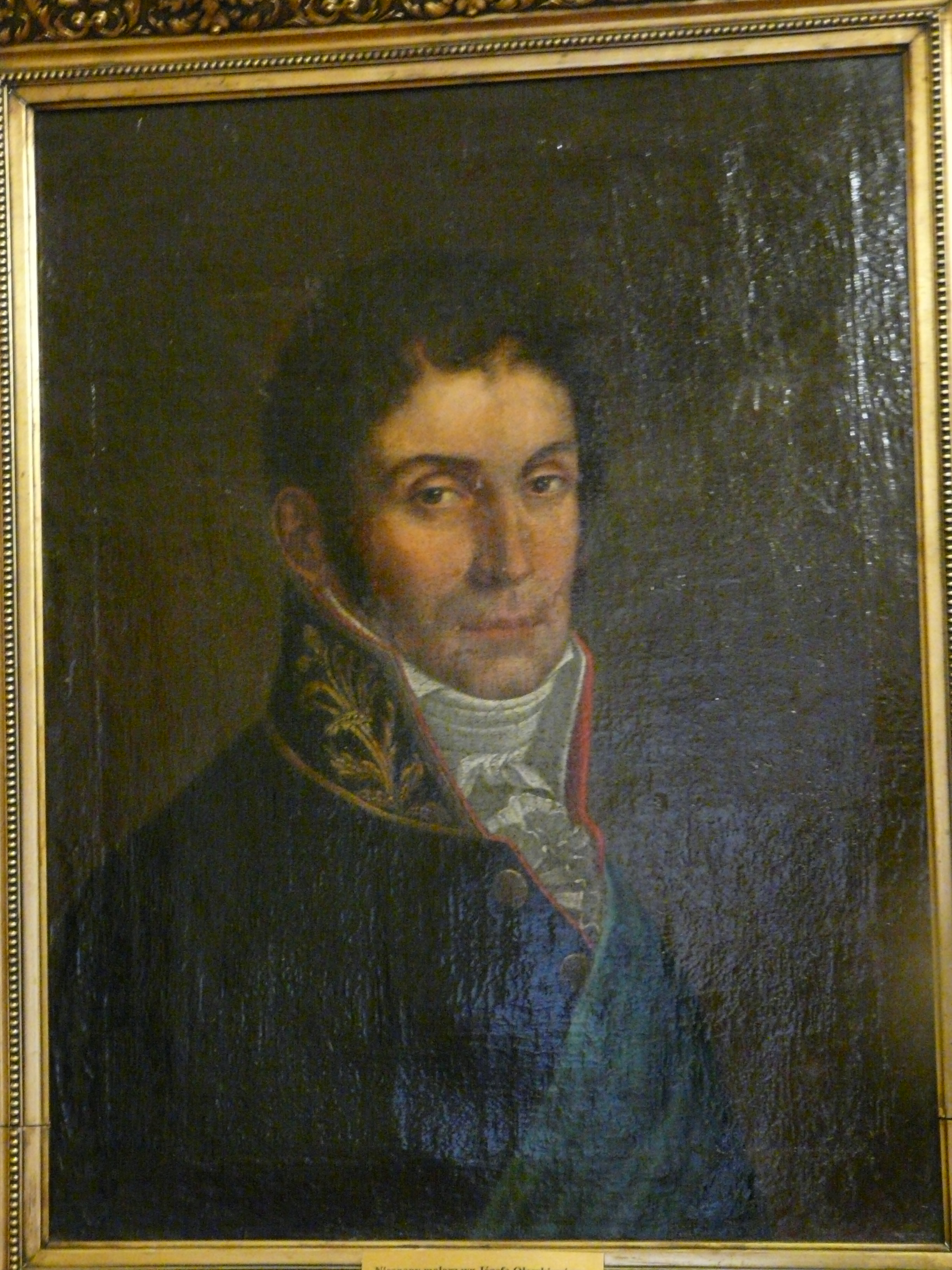 Bielsko-Biała in 2018. :Muzeum w Bielsku-Białej - Zamek książąt Sułkowskich